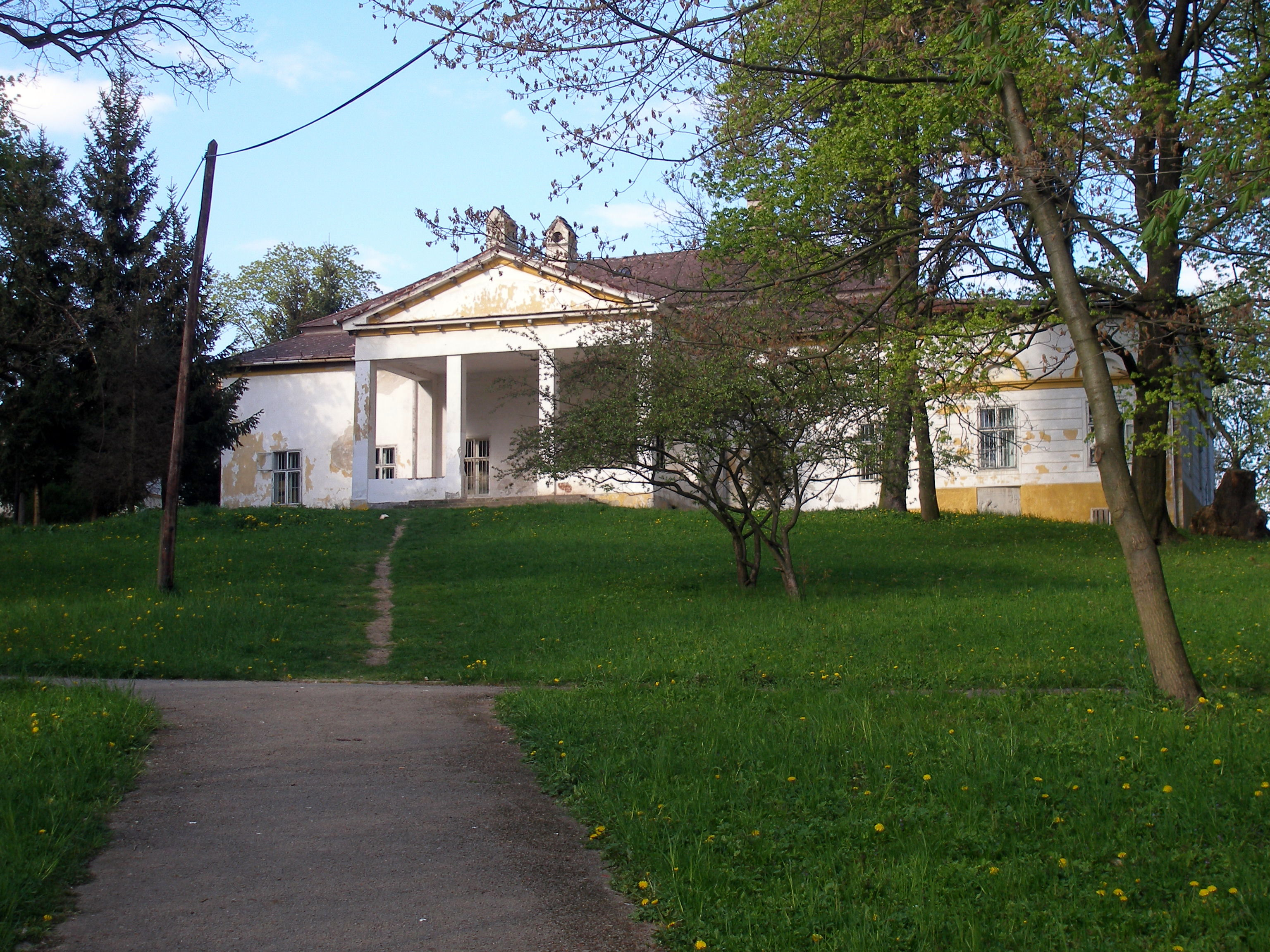 Obec Župčany okres Prešov región Šariš